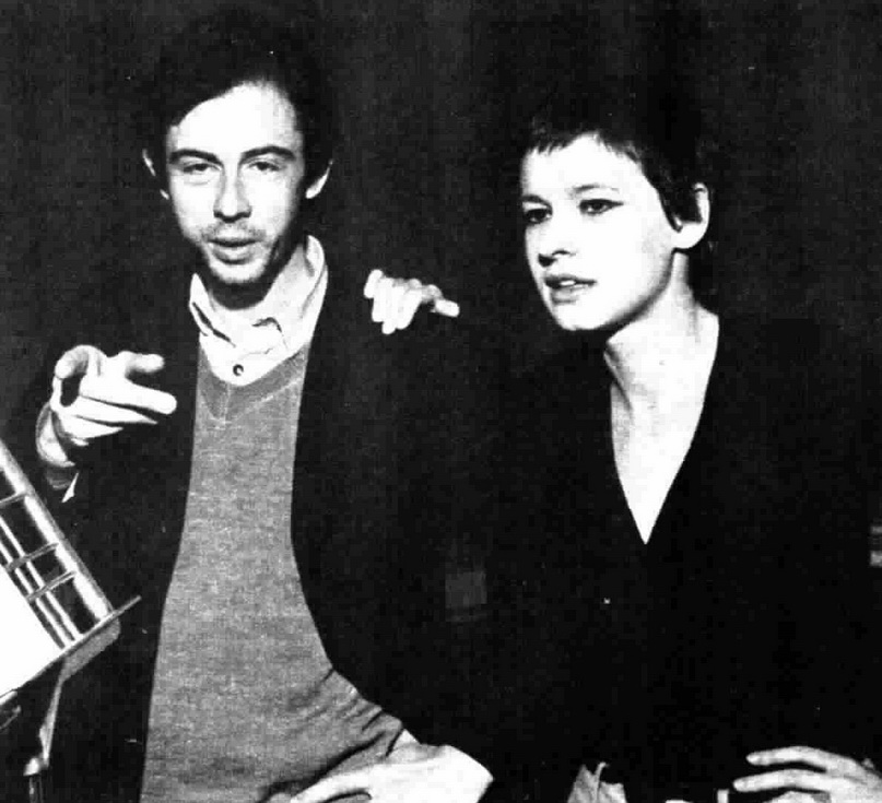 Italian actors Claudio Trionfi and Mariella Zanetti